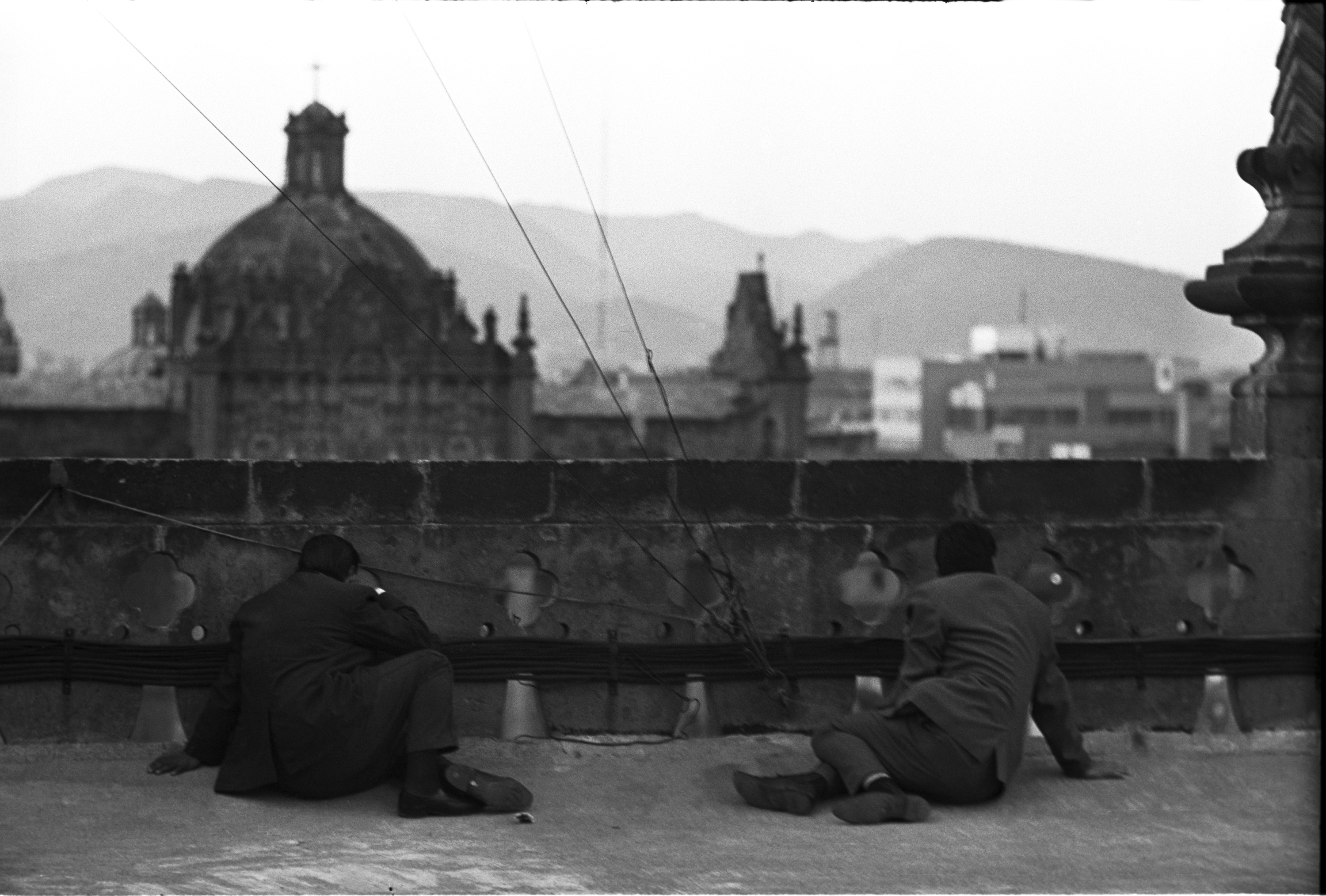 Fotografía antigua de la Ciudad de México resguardadas por el Museo Archivo de la Fotografía (MAF) de la Ciudad de México